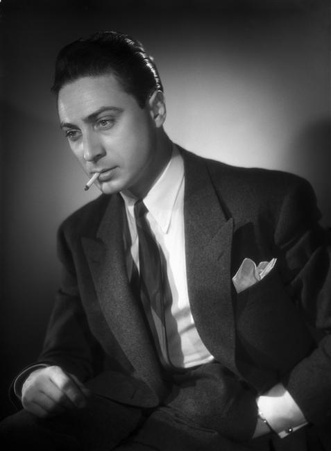 L'acteur Gérard Oury en 1948, photographié par le Studio Harcourt.